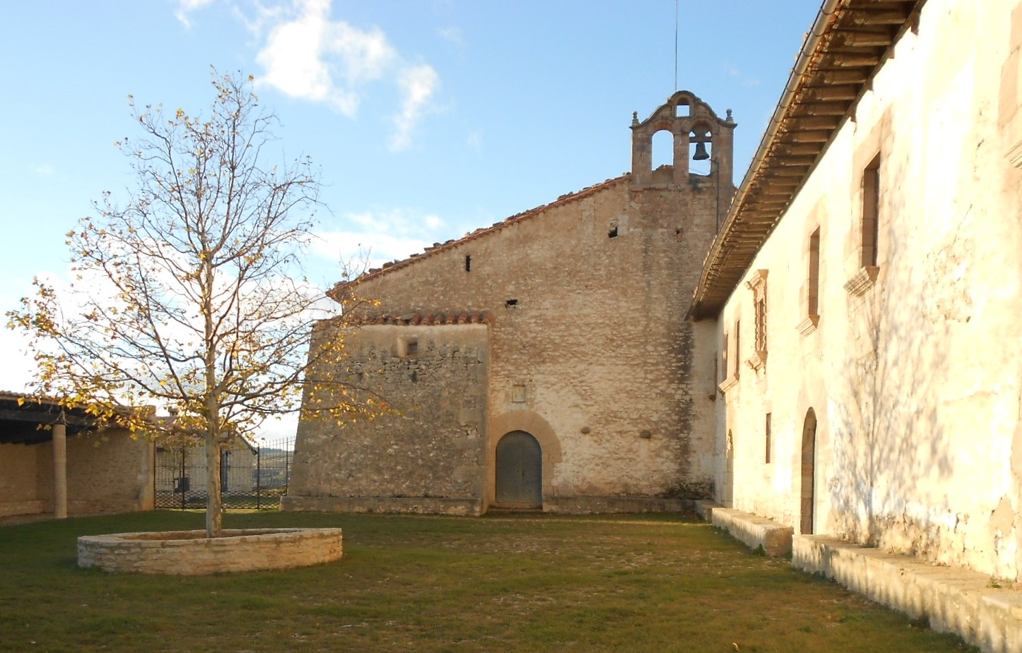 Santuario de la Virgen del Cid (La Iglesuela del Cid, España)